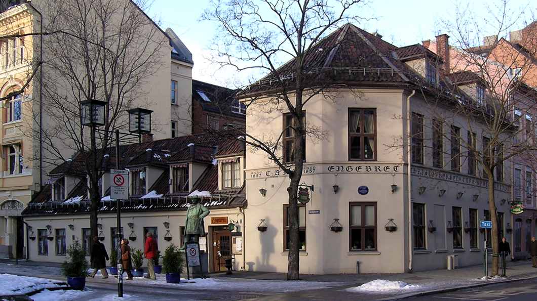 Engebrets Café, Bankplassen 1b, Oslo. Built 1760.